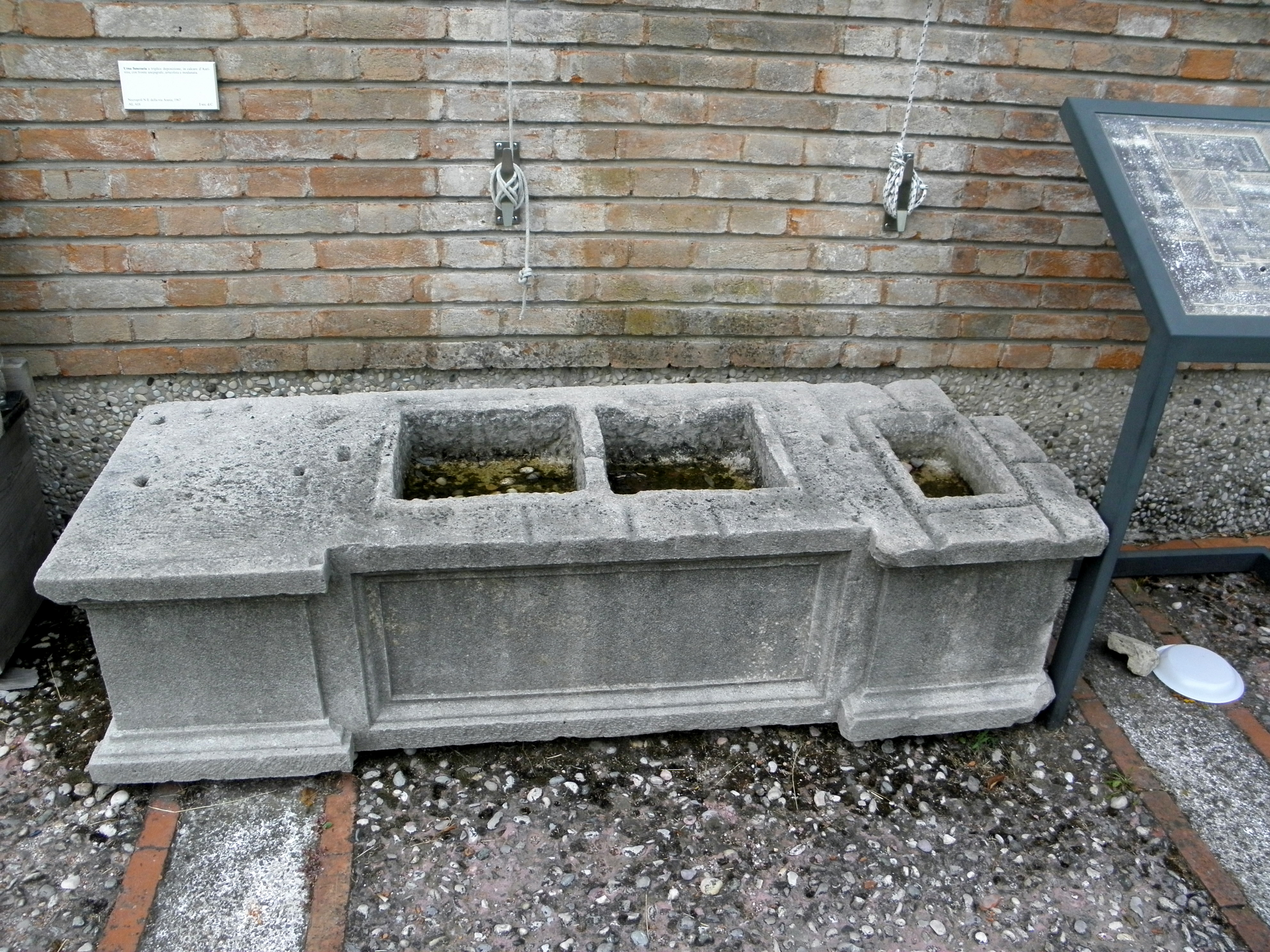 Altino, frazione di Quarto d'Altino: parte di un mausoleo ad edicola circolare proveniente dalla necropoli nord-orientale di Altinum.